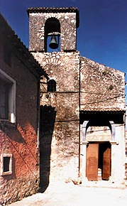 A church in Teggiano, an italian municipality.